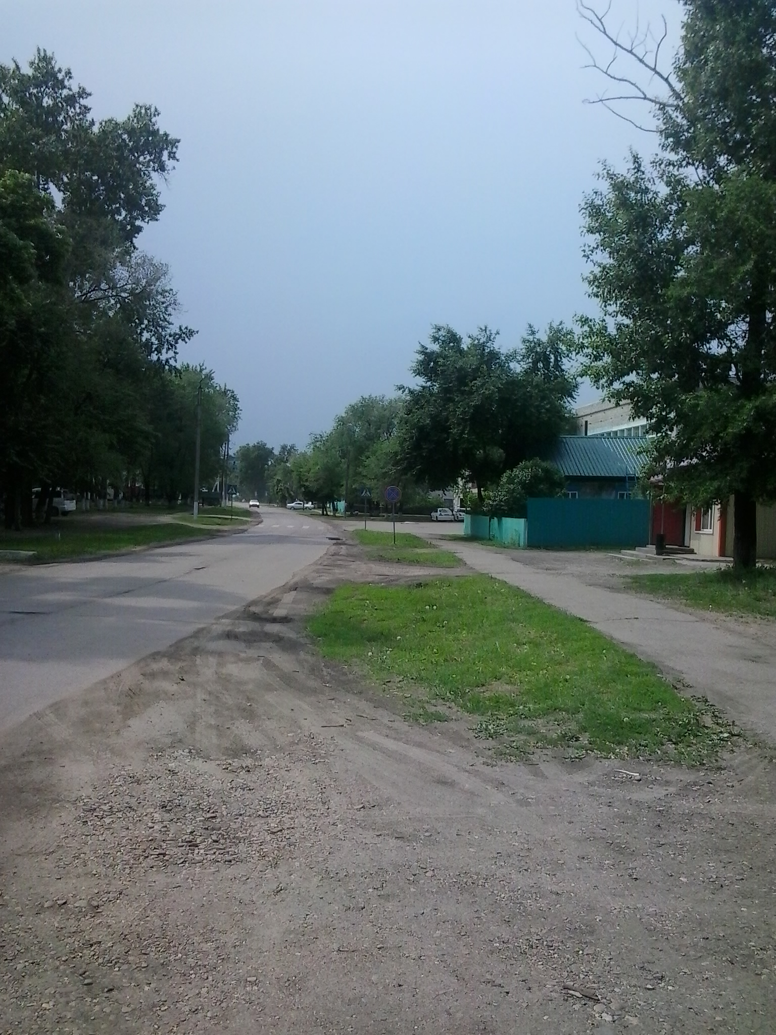 ул.Ленина